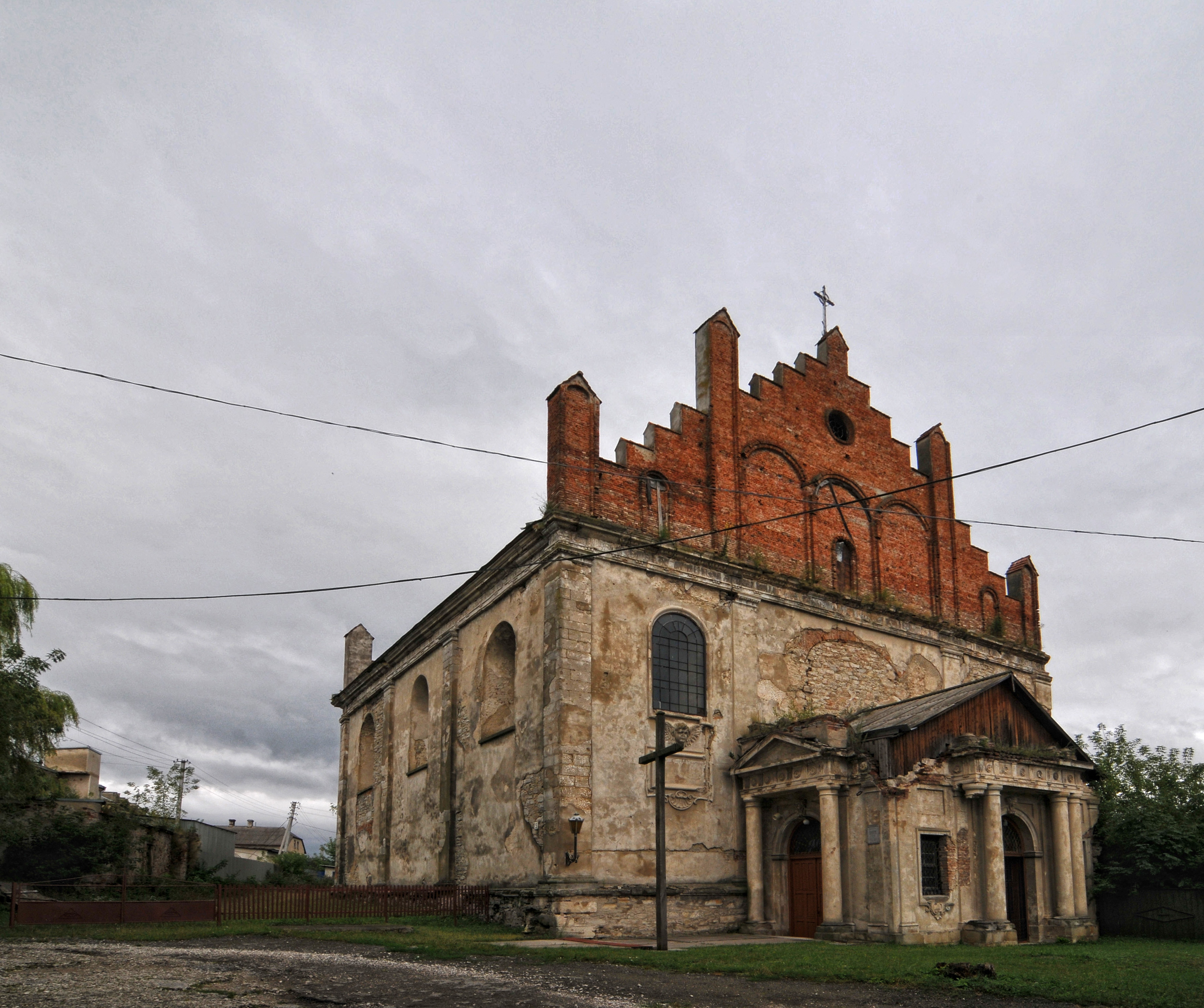 Гусятин, Бернардинський монастир